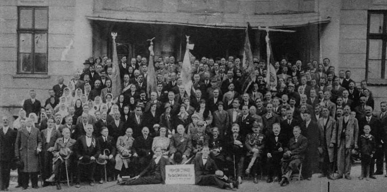 Poświęcenie sztandaru Koła Związku Inwalidów Wojennych w Sanoku w 1933. Na zdjęciu m.in. zastępca starosty sanockiego Józef Trznadel, ppłk Józef Giza z małżonką, burmistrz Tadeusz Malawski, poseł Stanisław Augustyński, inspektor szkolny Antoni Szemelowski, naczelnik sądu grodzkiego Antoni Czerny.